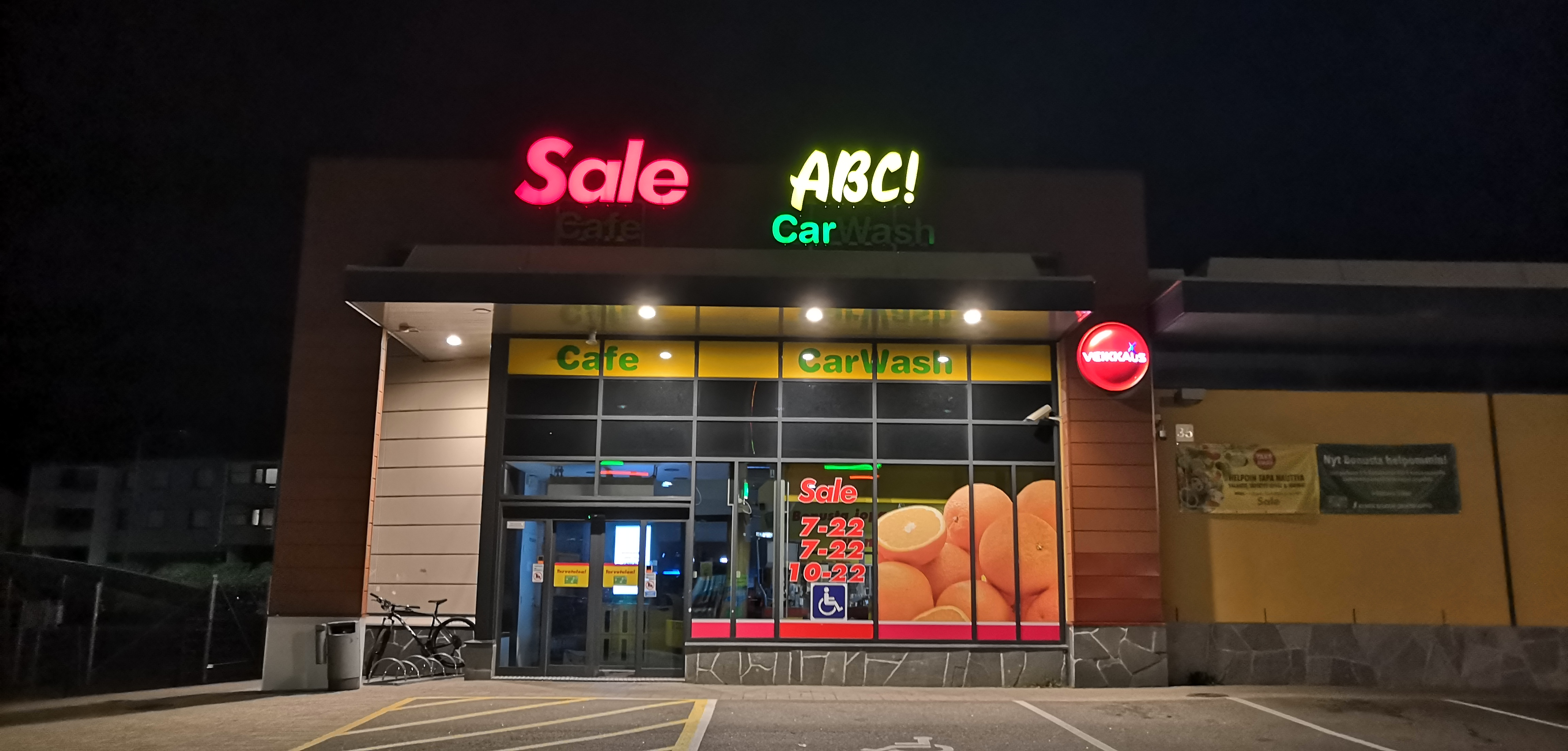 ABC ja Sale Kauppalankatu Kouvolassa